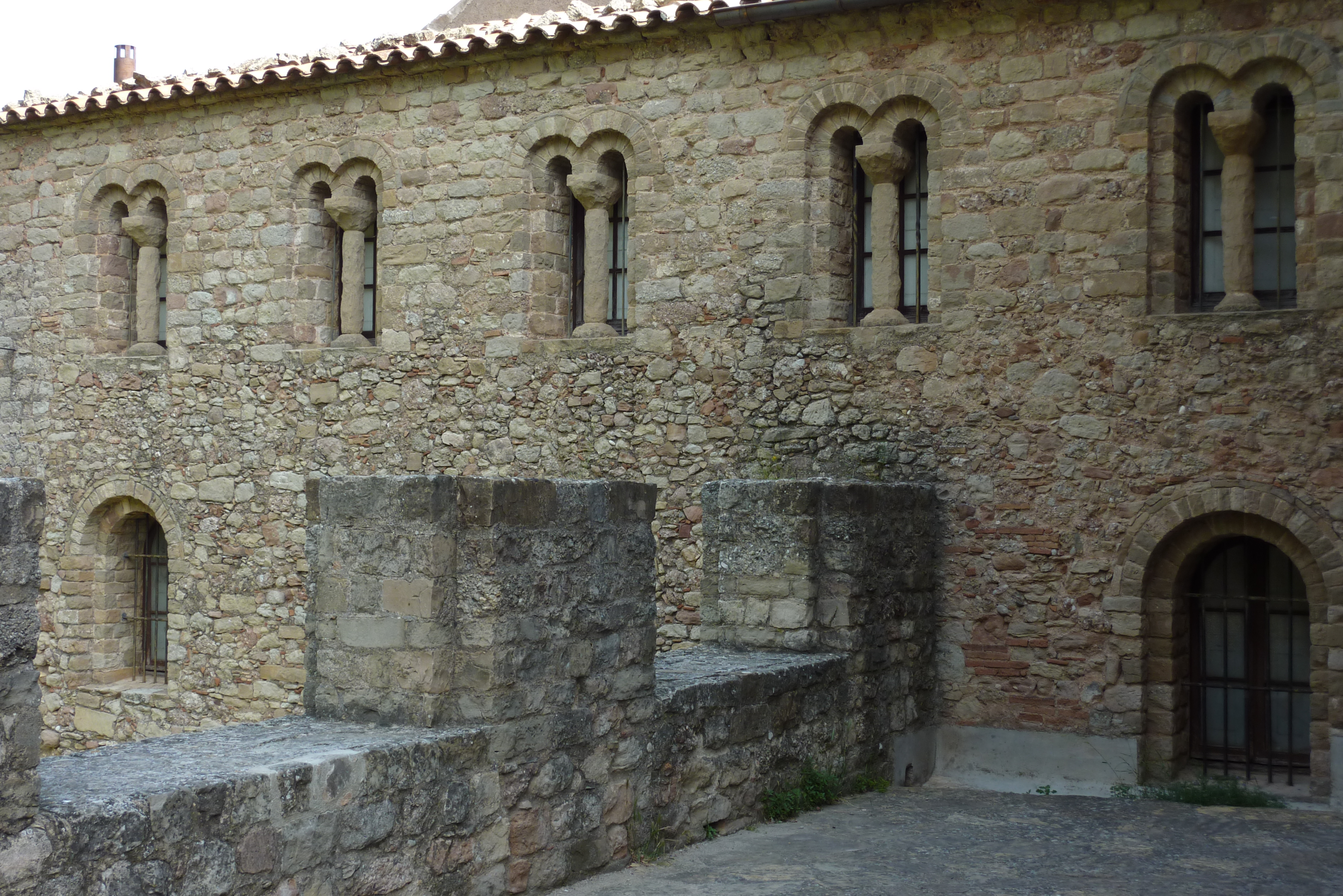 Kirche Santa Cecilia auf dem Montserrat (Berg)